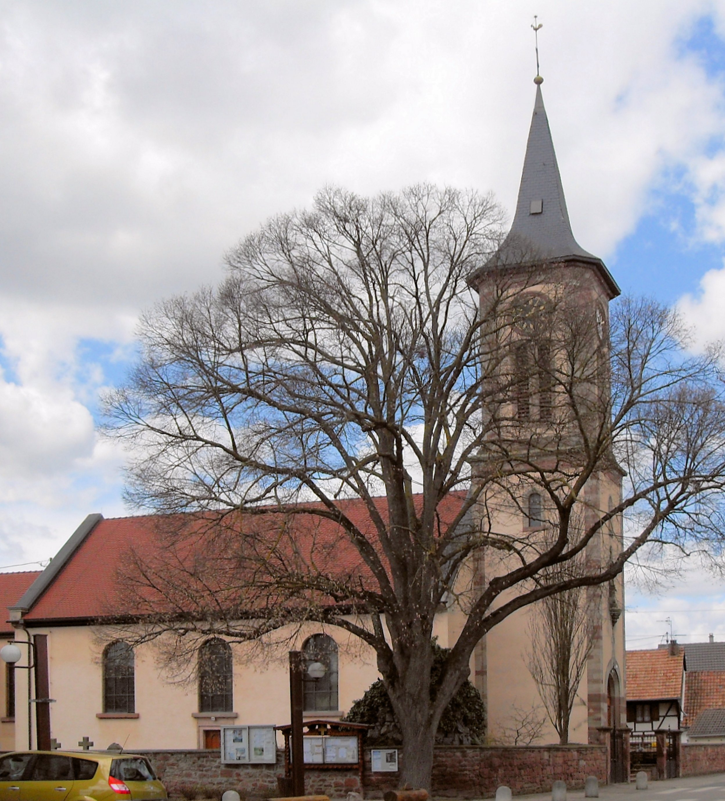 L'église Saint-Blaise à Bootzheim, côté sud-est